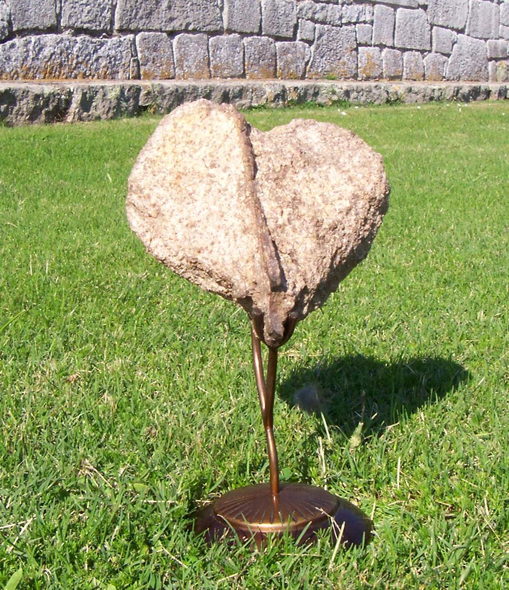 Corazón de Piedra del Parque nacional de Santa Teresa también conocido como Corazón de Alúa